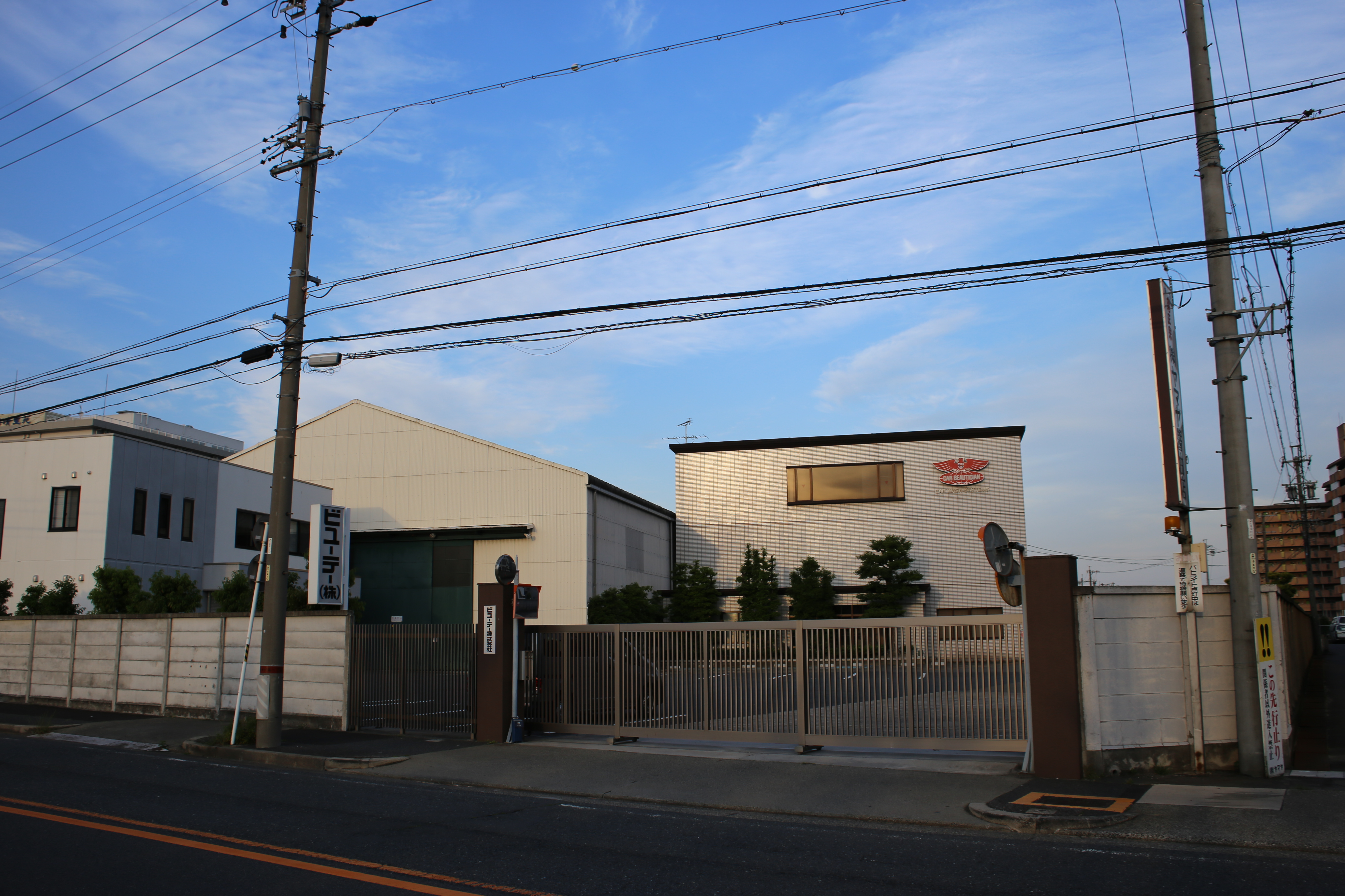 名古屋市港区木場町のビユーテー本社を西側公道南側より撮影